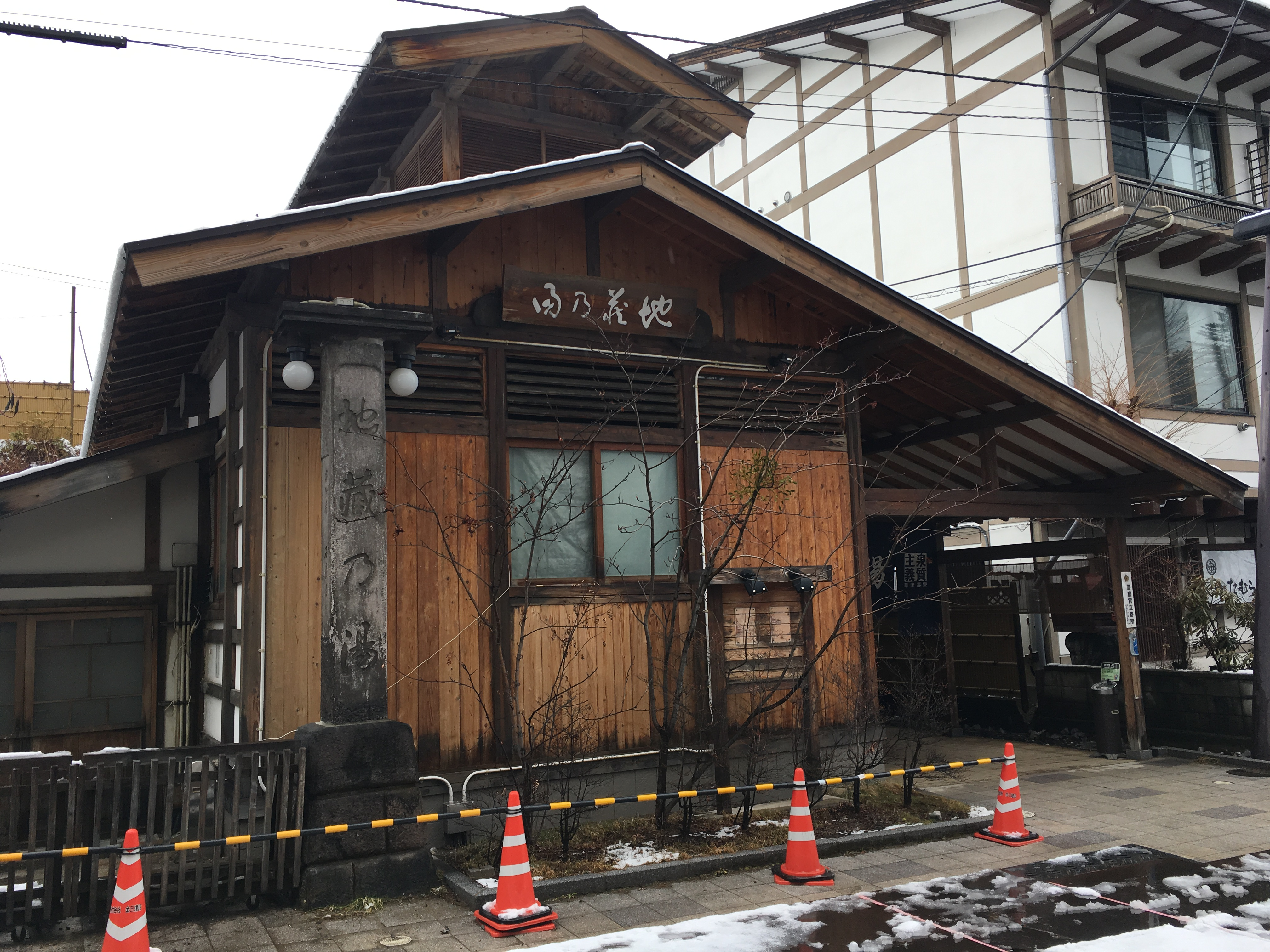 草津温泉の地蔵の湯